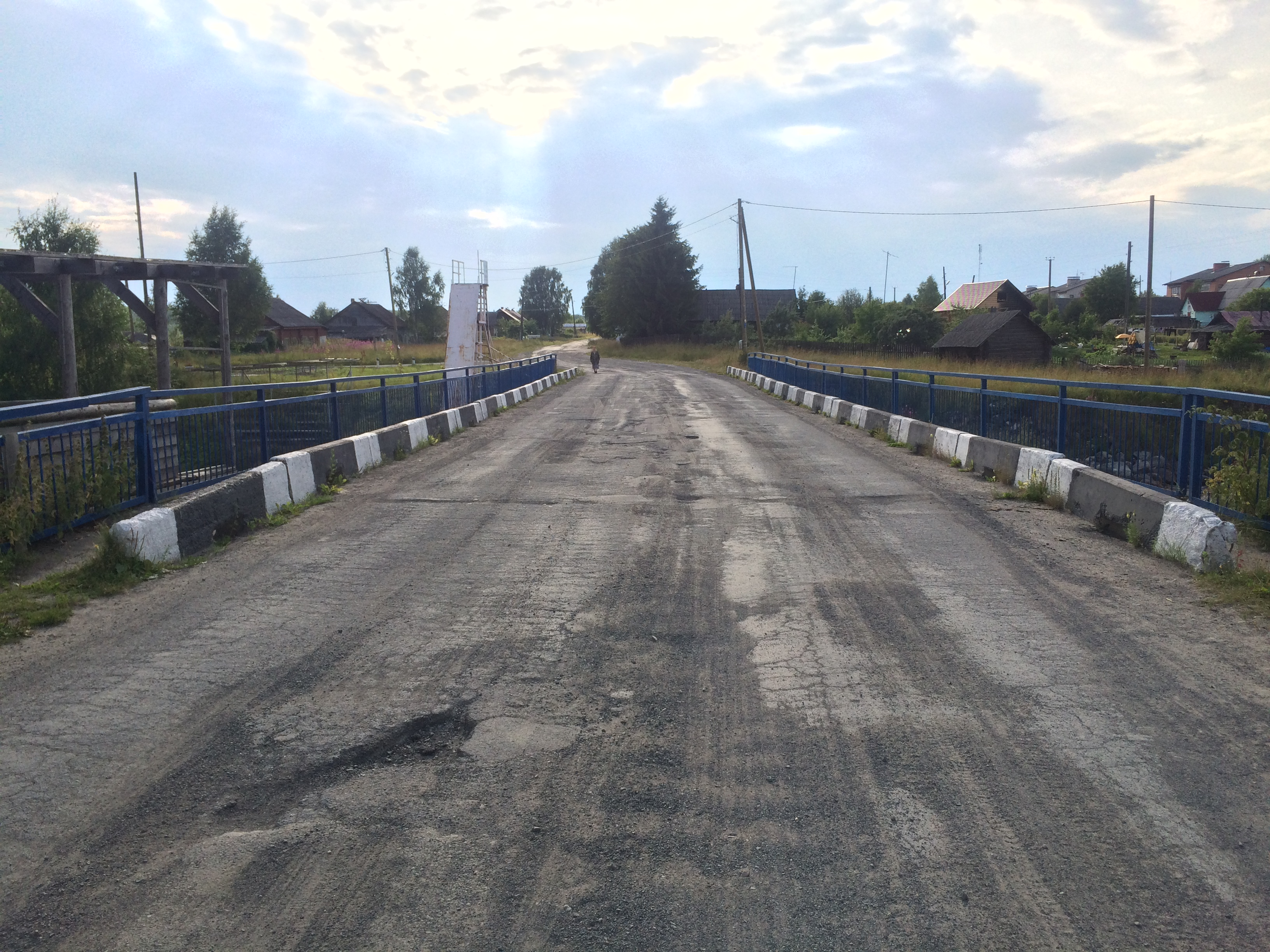 Тивдия (река)